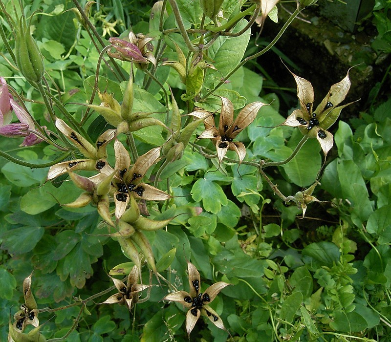 Aquilegia vulgaris